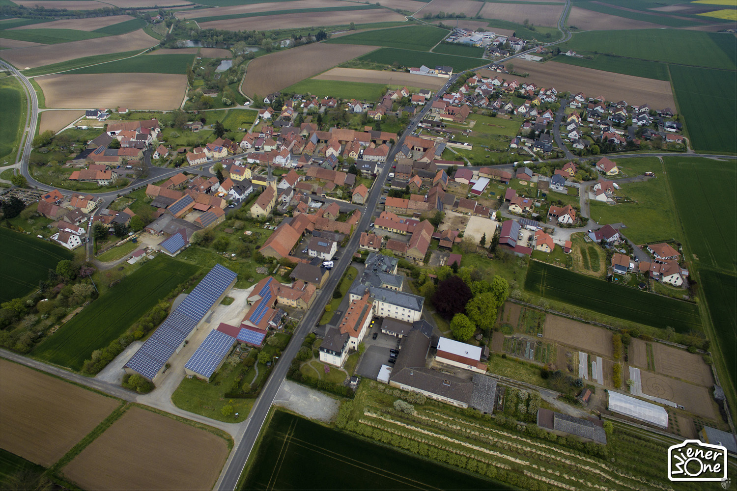 Luftbild von Lülsfeld aus westlicher Richtung